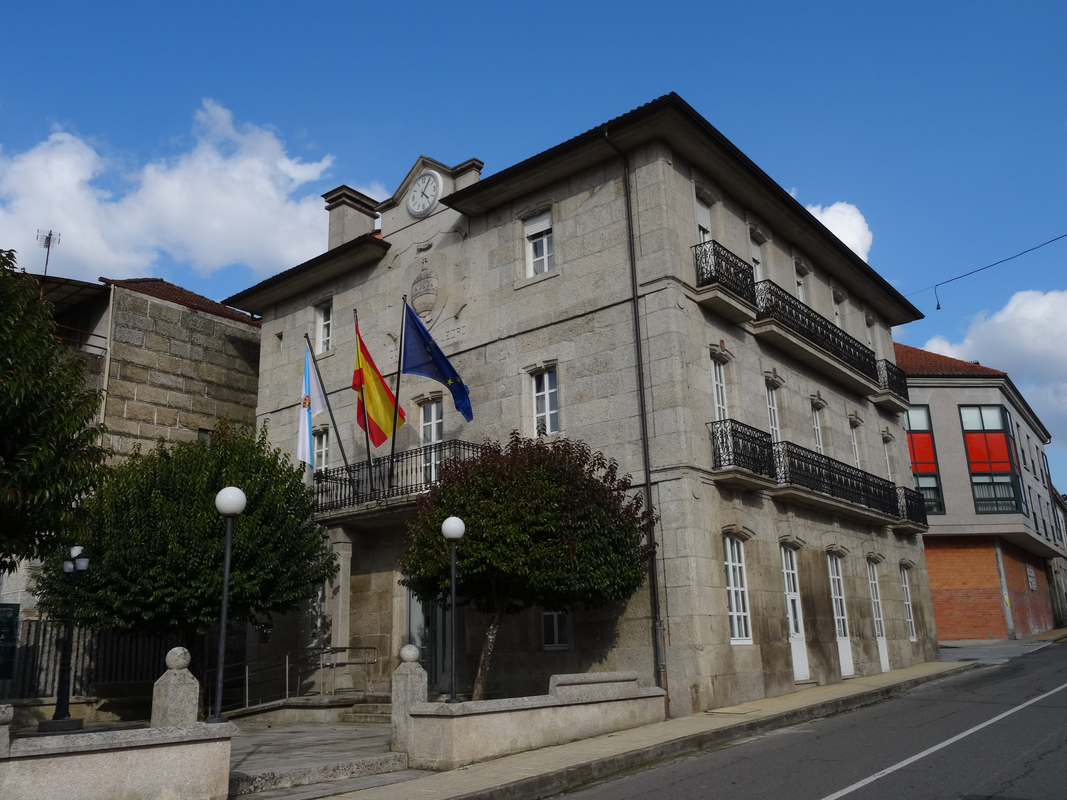 Casa do concello de Leiro.